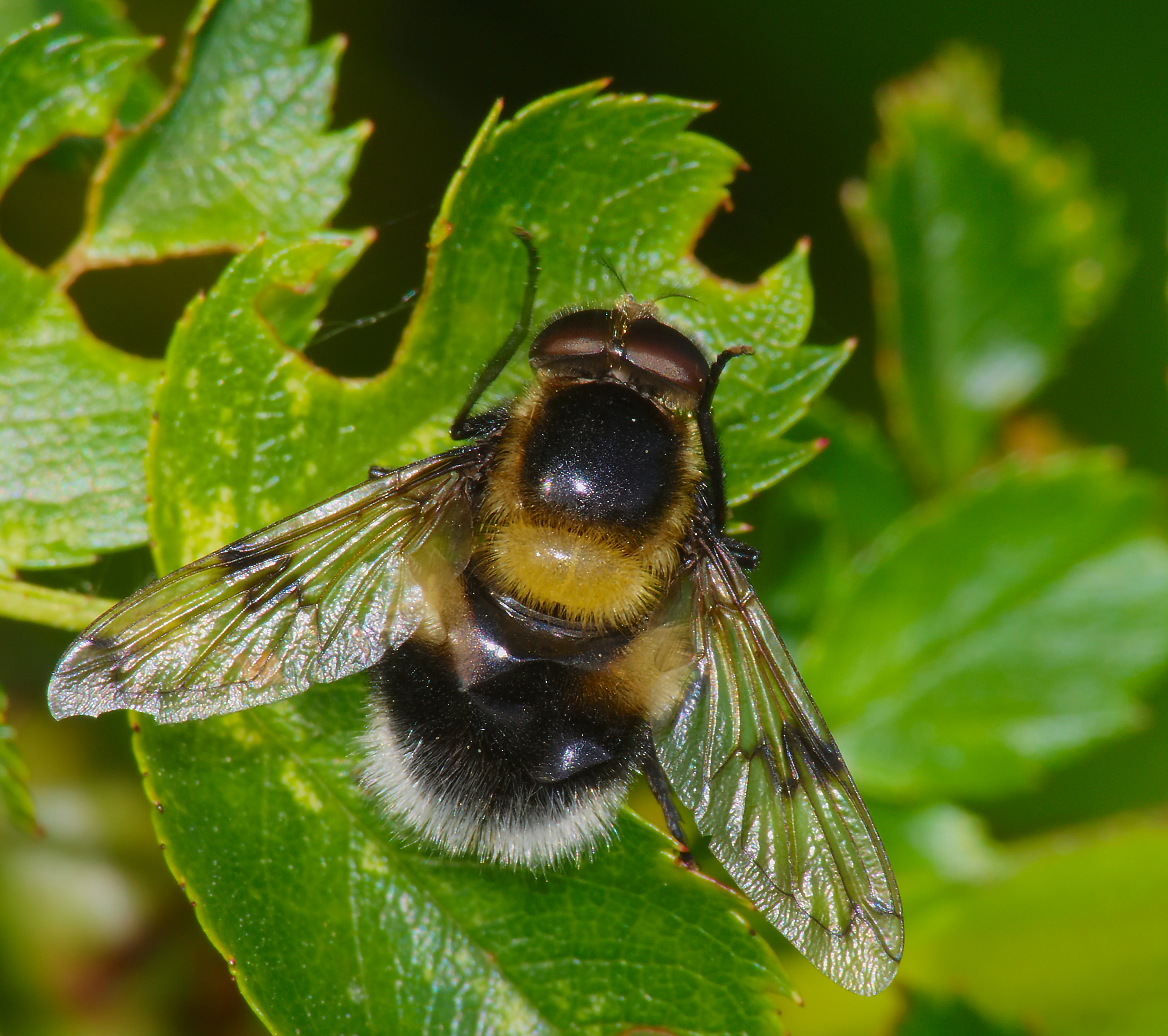 Hummel-Waldschwebfliege - Volucella bombylans. Aufgenommen in Mannheim, Kirschgartshäuser Schläge am Bruchgraben, Baden-Württemberg, Deutschland.